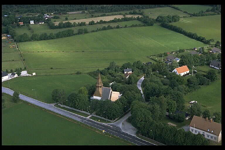 Motiv: Träkumla kyrka Nyckelord: Flygbilder, Riksintressen Kategori: Kyrkomiljö Träkumla kyrka. Länsväg 142 går förbi söder om kyrkan.